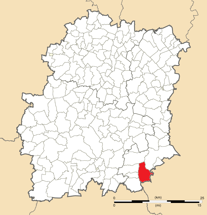 Carte de position de Buno-Bonnevaux en Essonne (91)